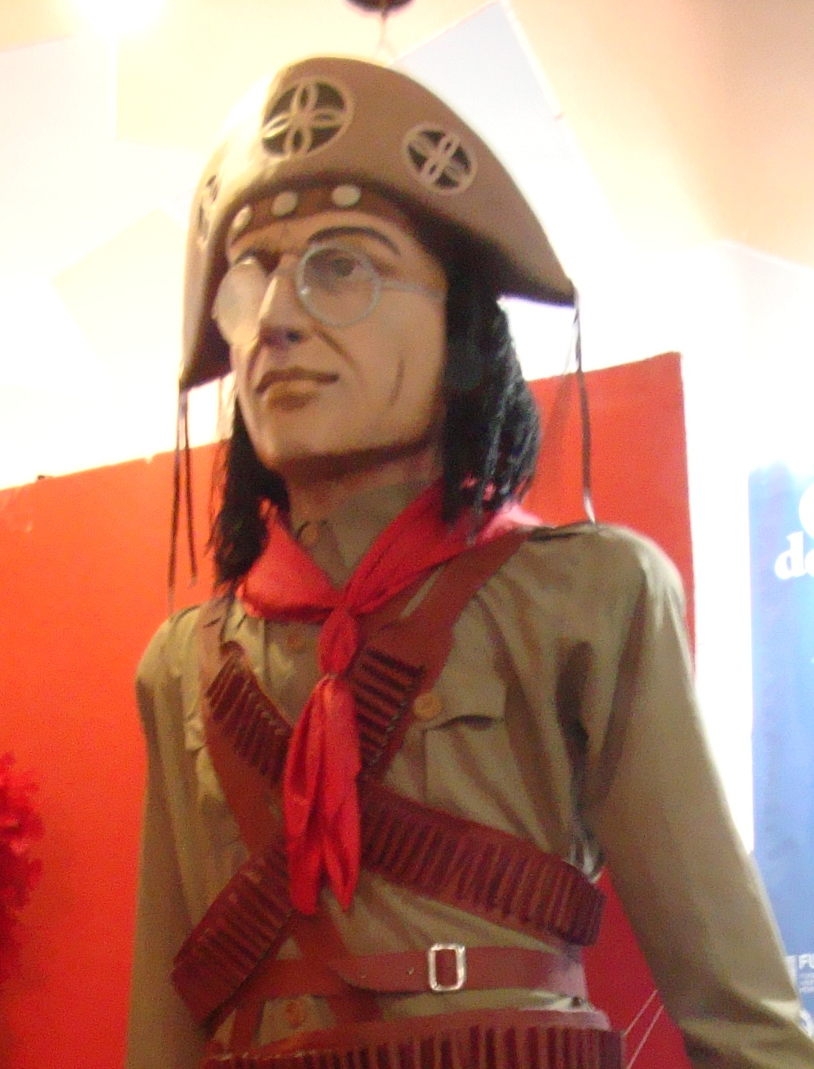 Lampião - Bonecos gigantes de Pernambuco.